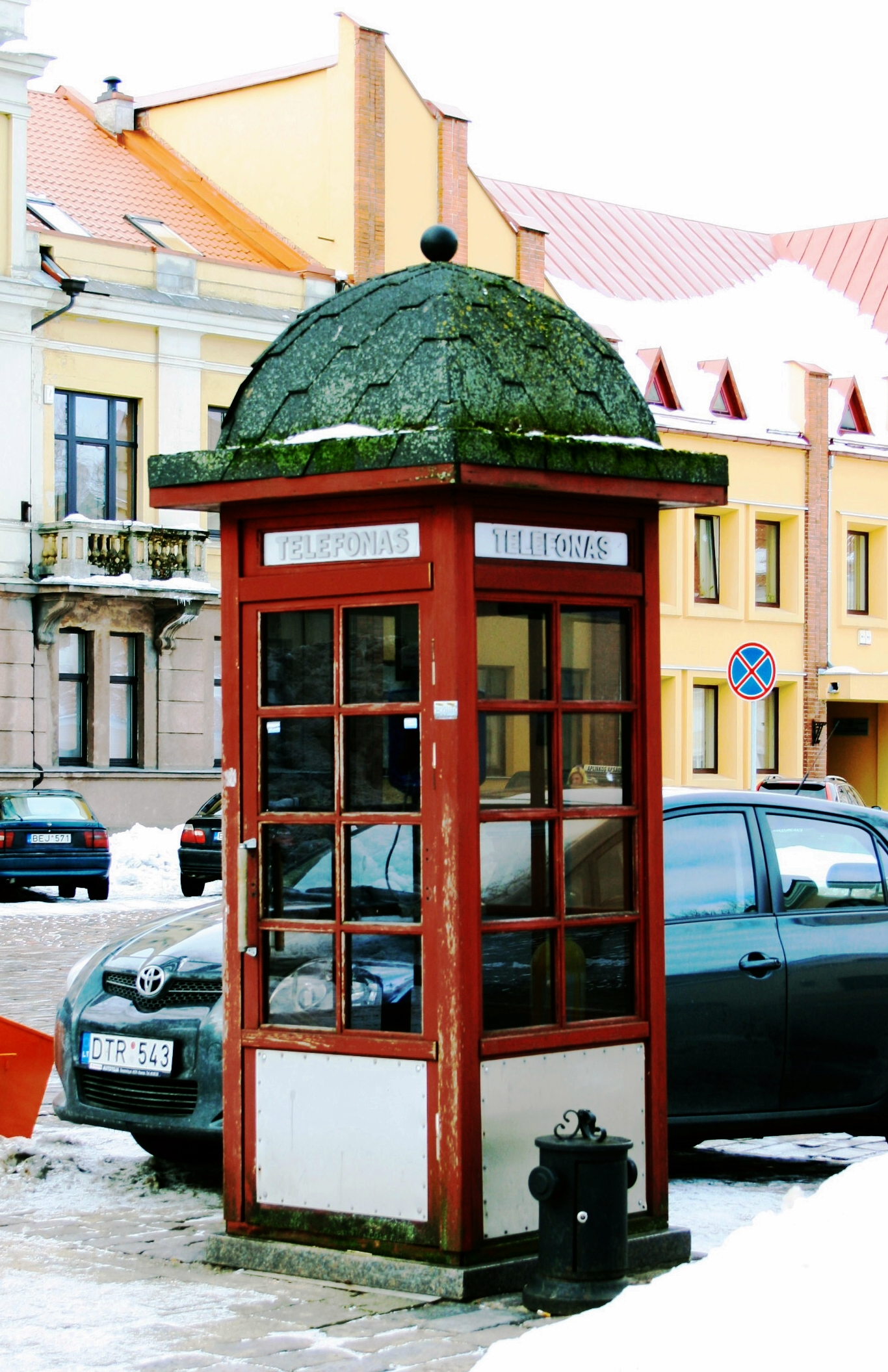 Telefonzelle in Litauen - Kaunas.